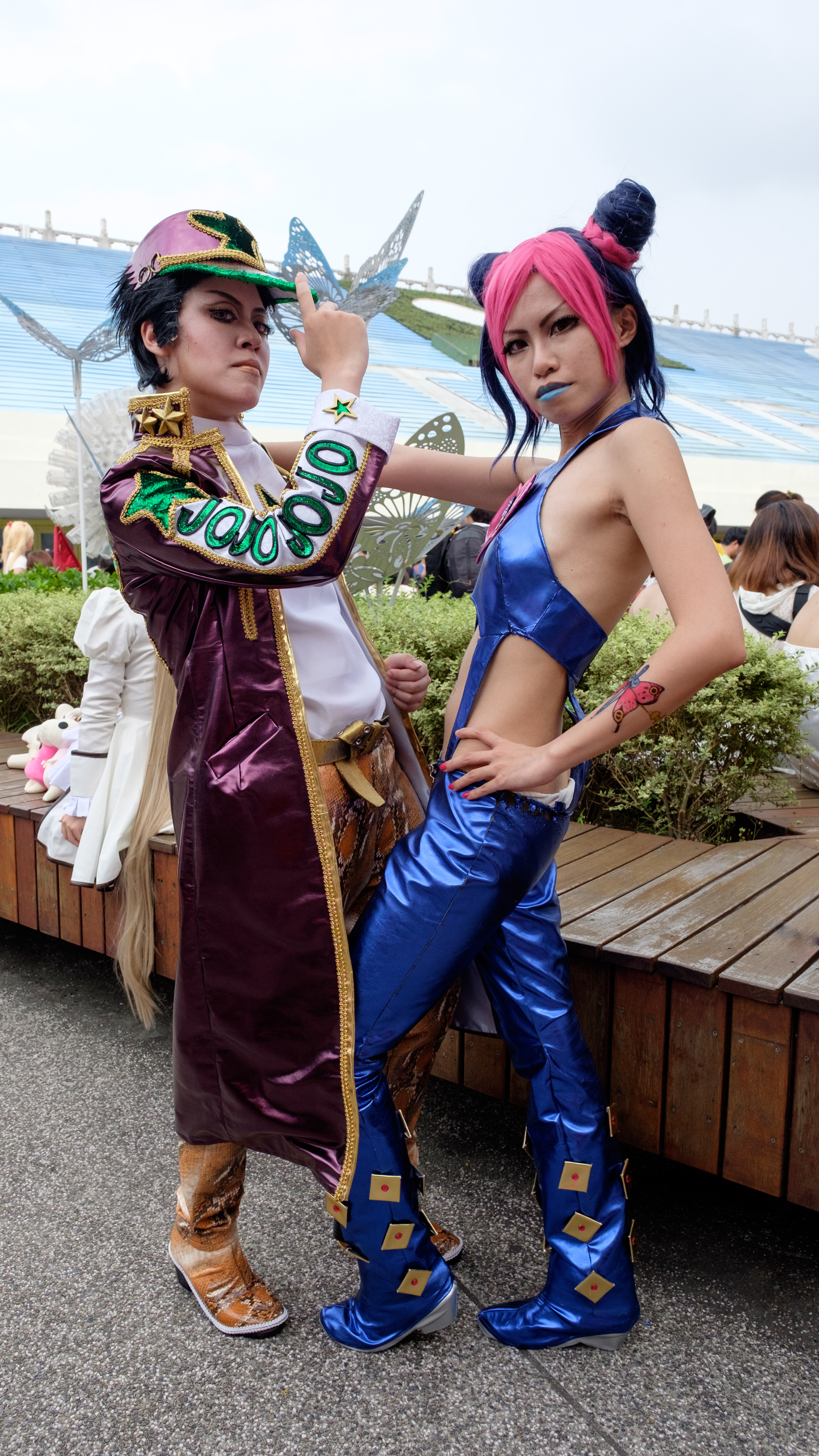 PF24第一日下午，兩位女性cosplayer扮演＜ジョジョの奇妙な冒険＞第6部空條承太郎（左）與空條徐倫（右）父女。